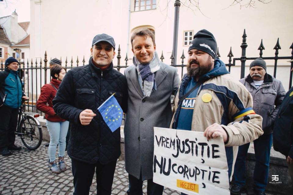 Participând la protestele #rezist